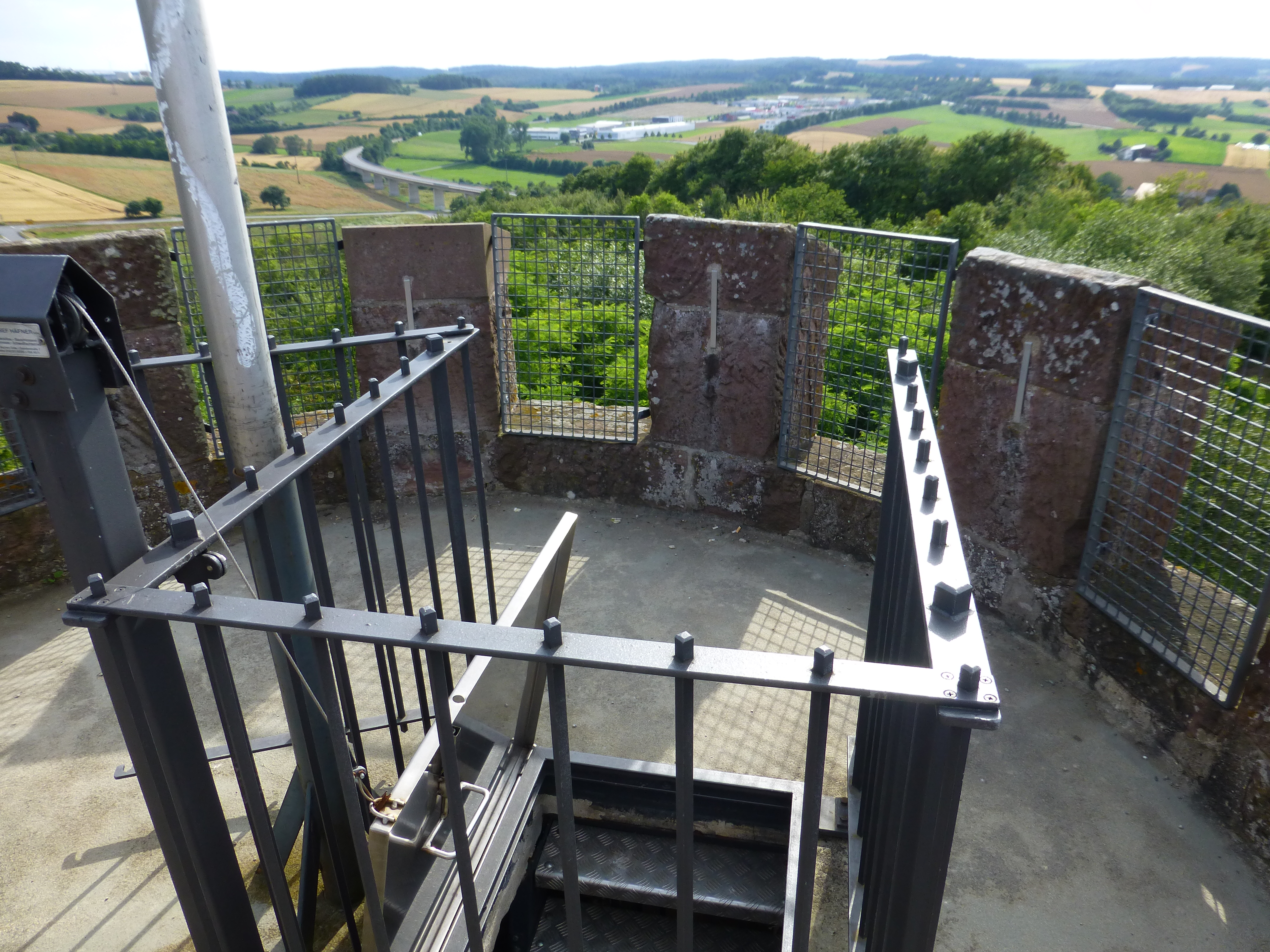 Wartturm (Buchen); Aussichtsplattform mit verschließbarem Treppenausgang; Blick nach Westsüdwesten zum Industriegebiet von Buchen